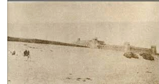 قصر امارة بريدة سابقا